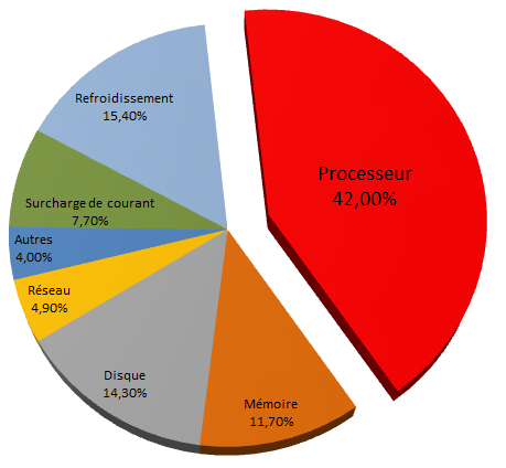 Répartition de la charge processeur